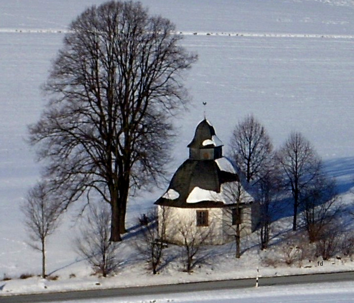 Kapelle an der L 840 zwischen Calle und Laer